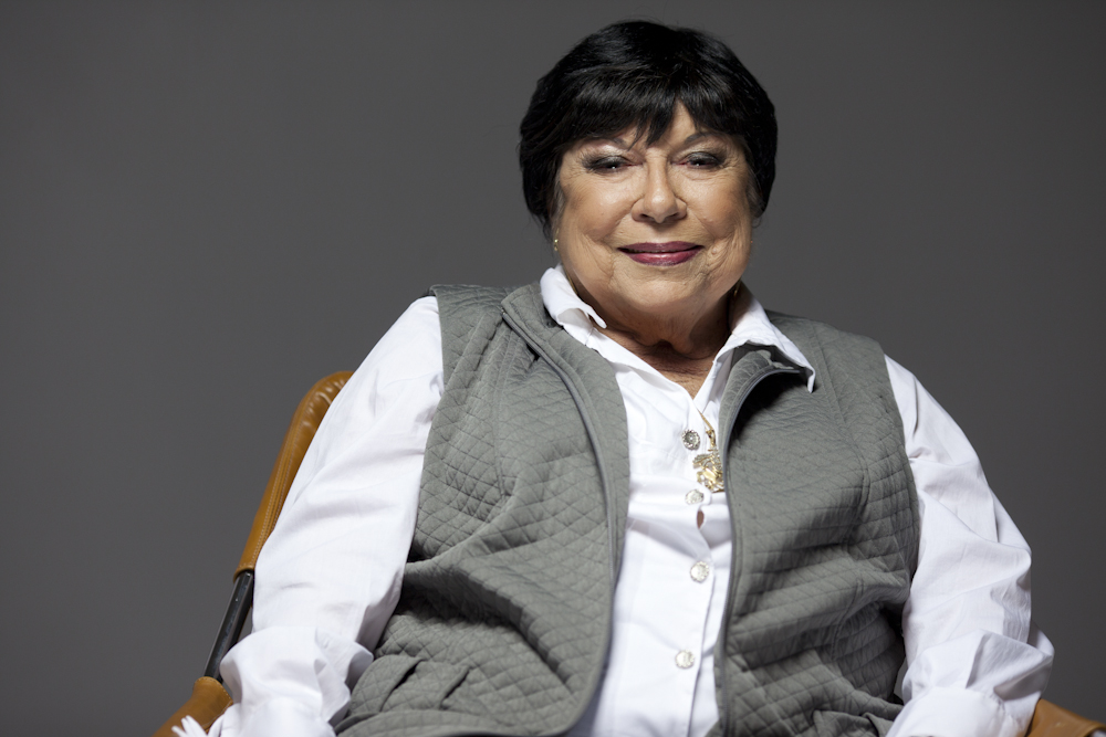 Foto tirada em 29/06/2010 pelo Garapa - Coletivo Multimídia ( Inezita Barroso em entrevista ao projeto Produção Cultural no Brasil: Inezita Barroso é cantora e apresentadora de TV.